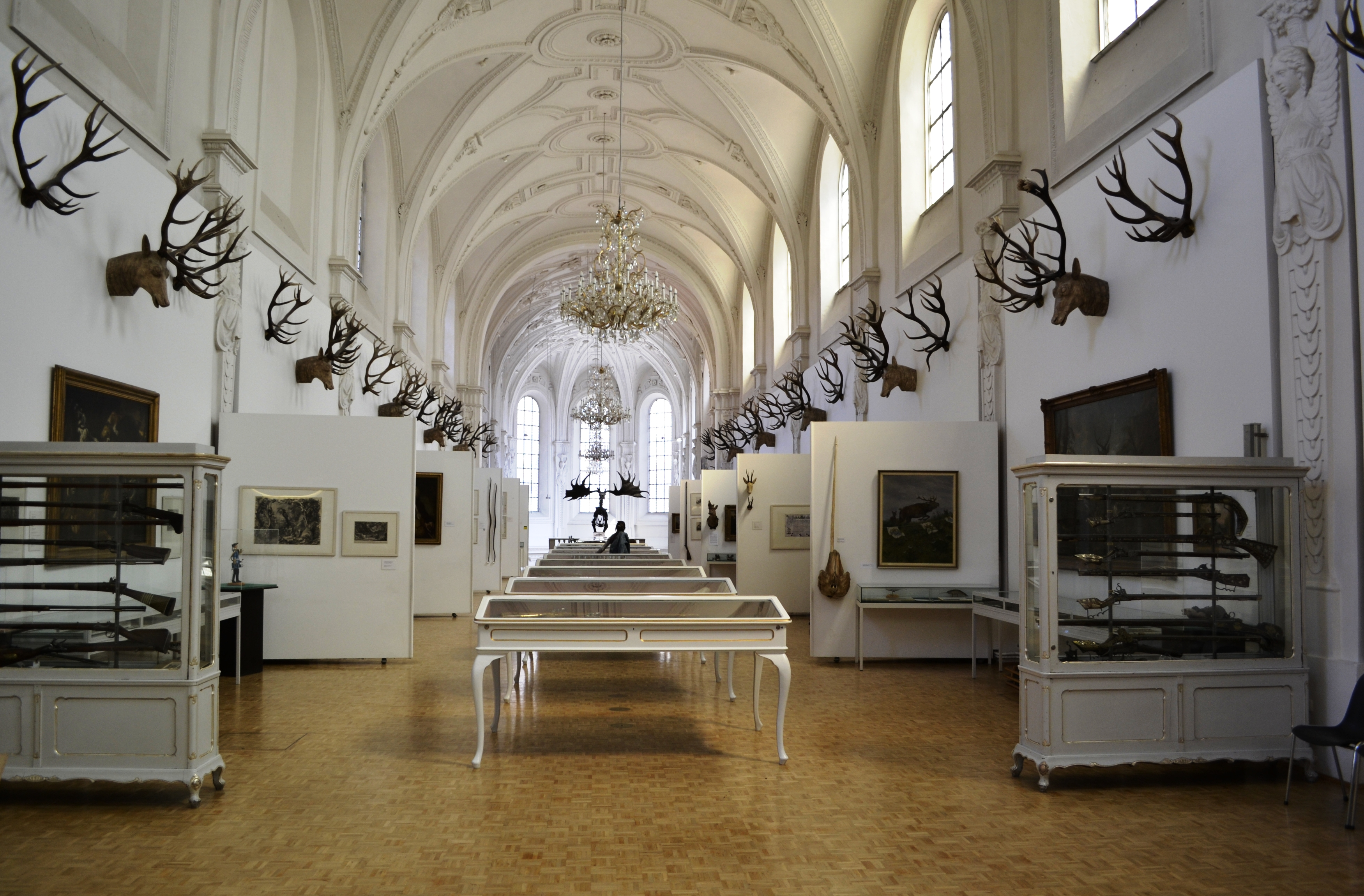 Im Inneren des Jagd- und Fischereimuseums in München.